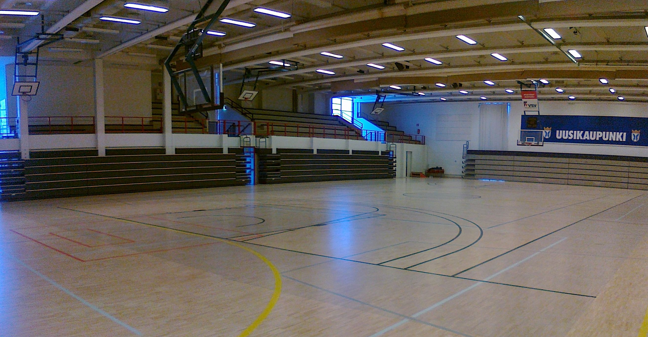 Pohitullin palloiluhalli